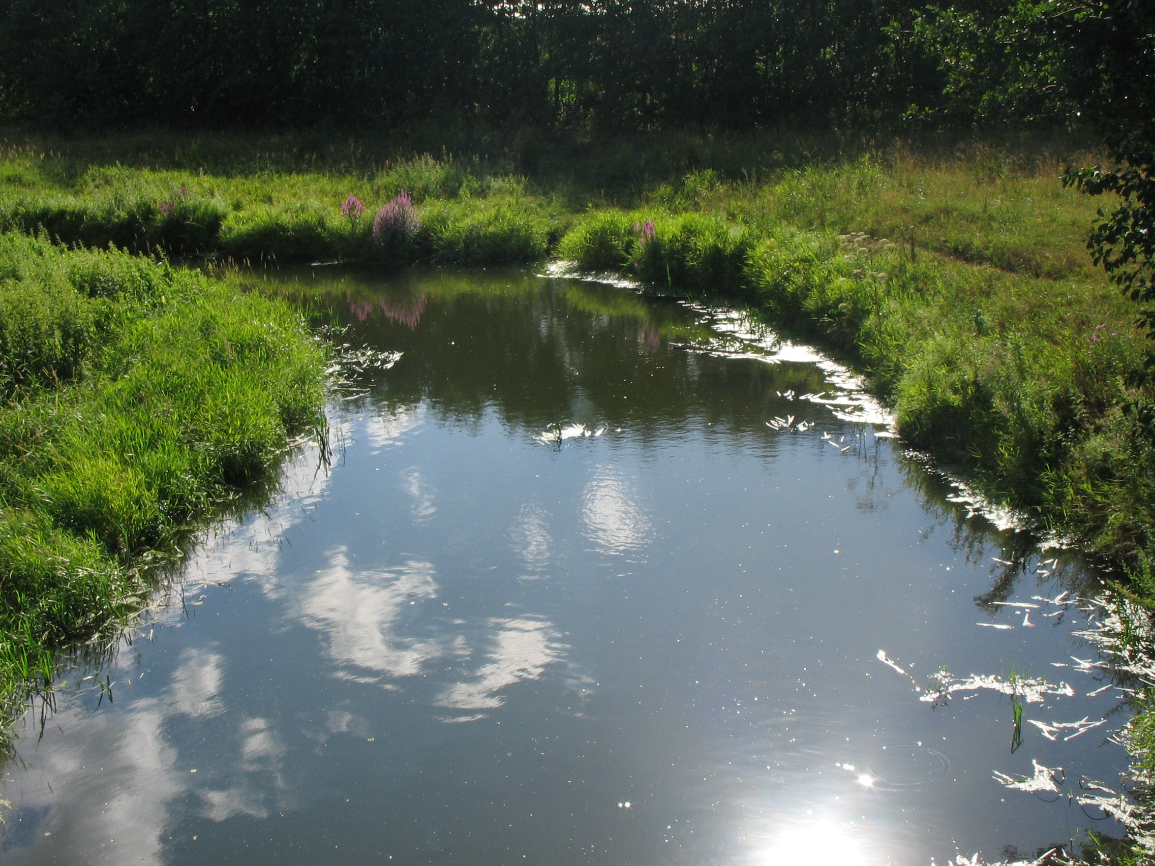 р. Чёрная